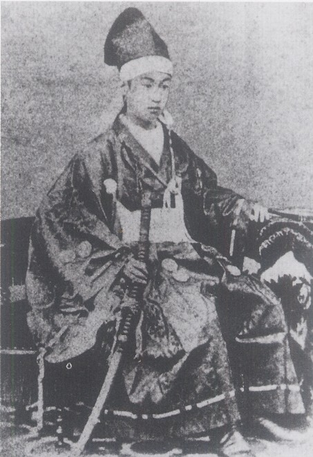 溝口直正 Mizoguchi Naomasa.